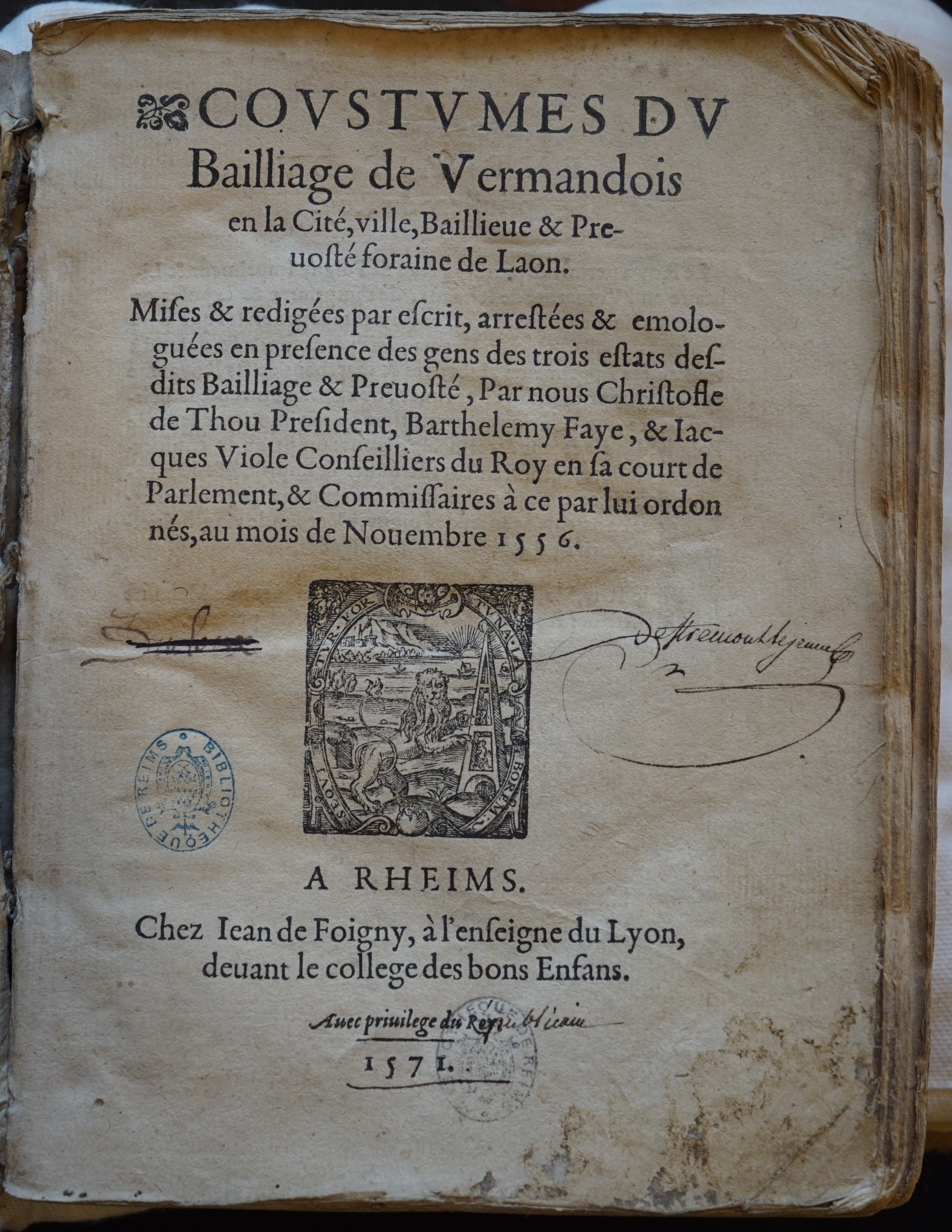 extrait de "Coustume Vermandois ..." rédigé par C. de Thou et imprimé par FOigny.